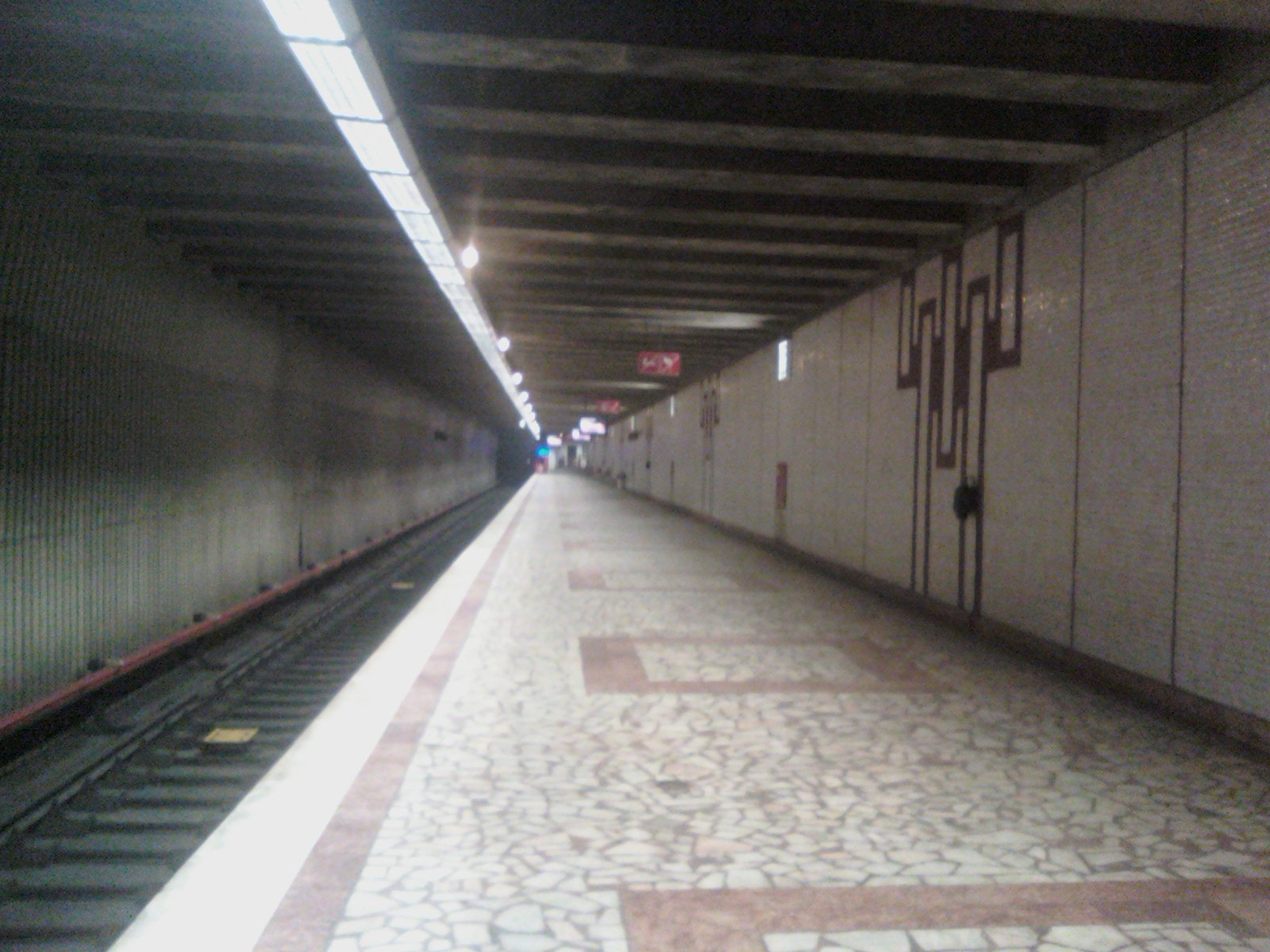 Stația de metrou Pantelimon din București.